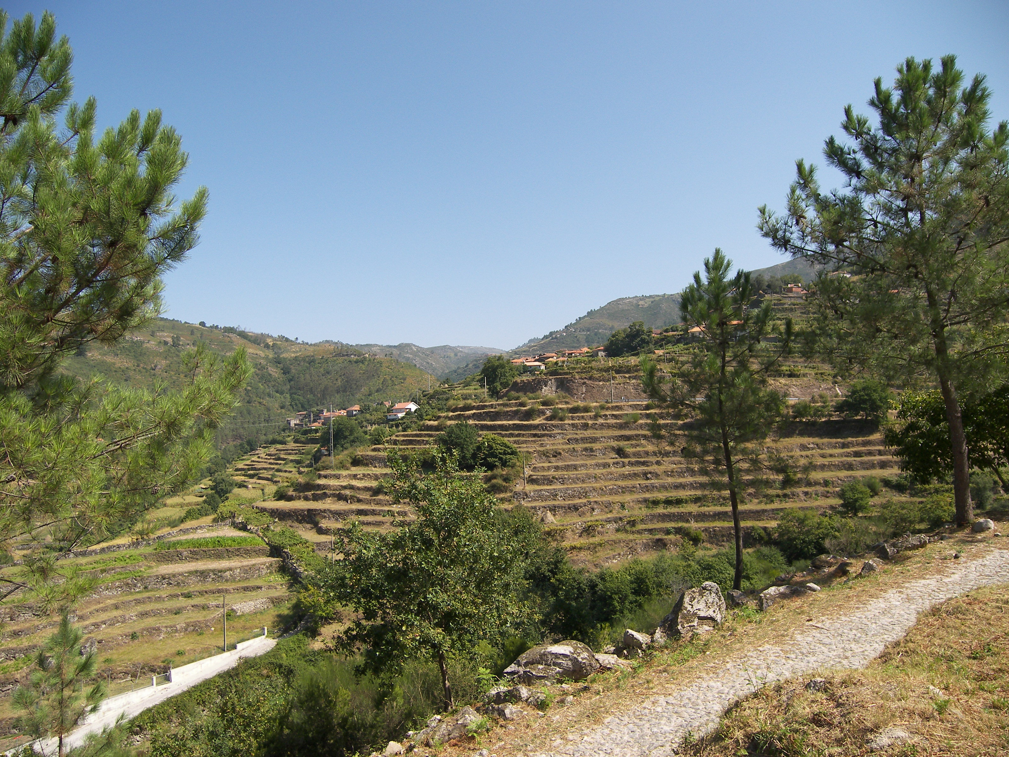 Terrassenanbau in Nordportugal